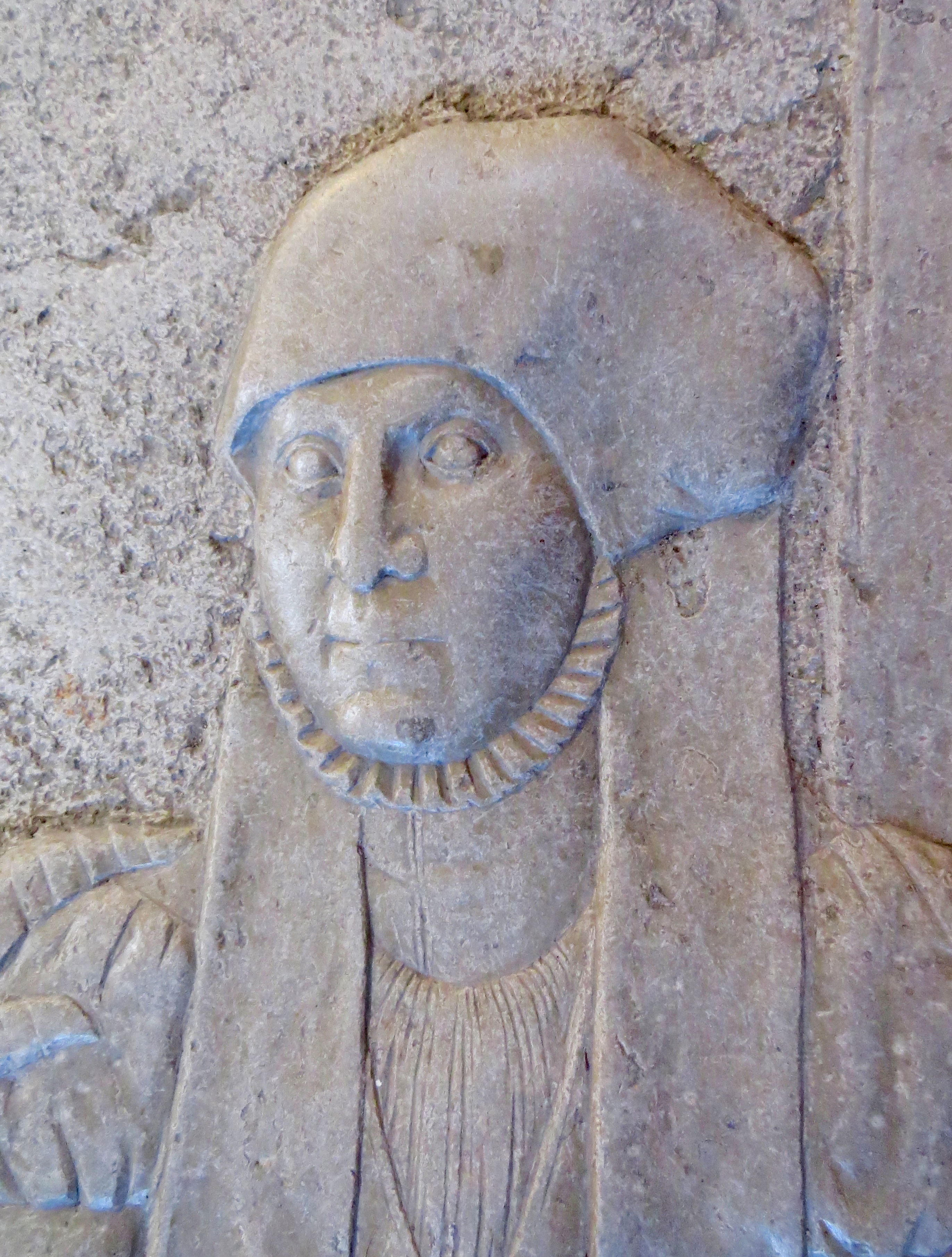 Eline Gøye, detalje fra gravsten med ektemannen Mourids Krognos og hans mor Anne Mouritsdatter Gyldenstierne, Skt. Bendts Kirke, Ringsted